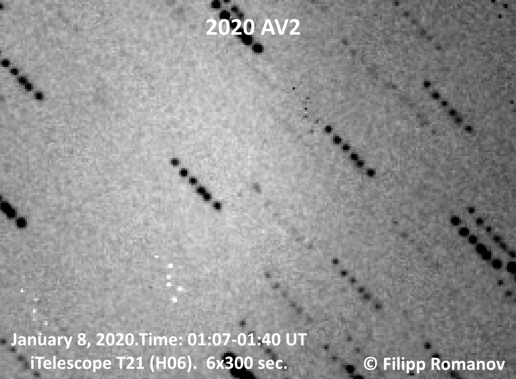 Астероид 2020 AV2